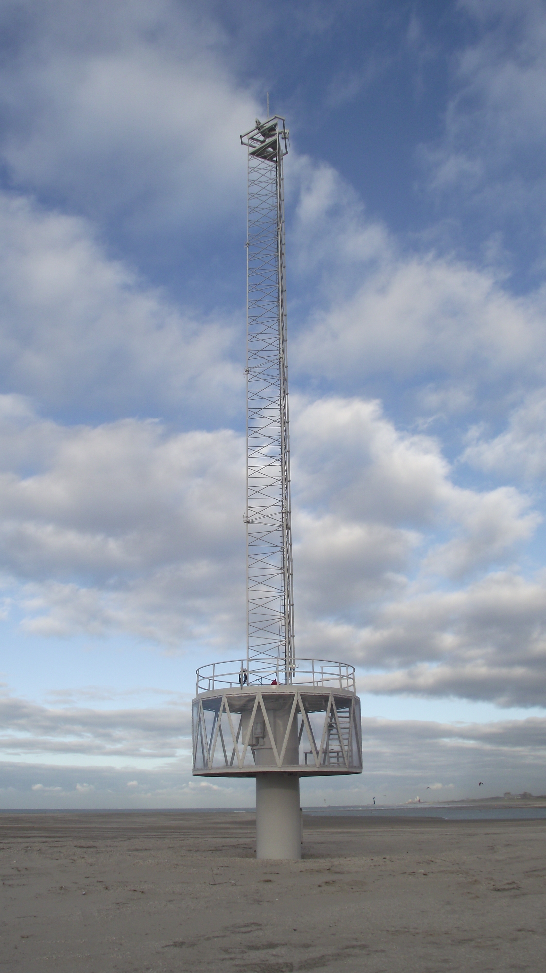 Observatietoren op het hoogste punt van de Zandmotor